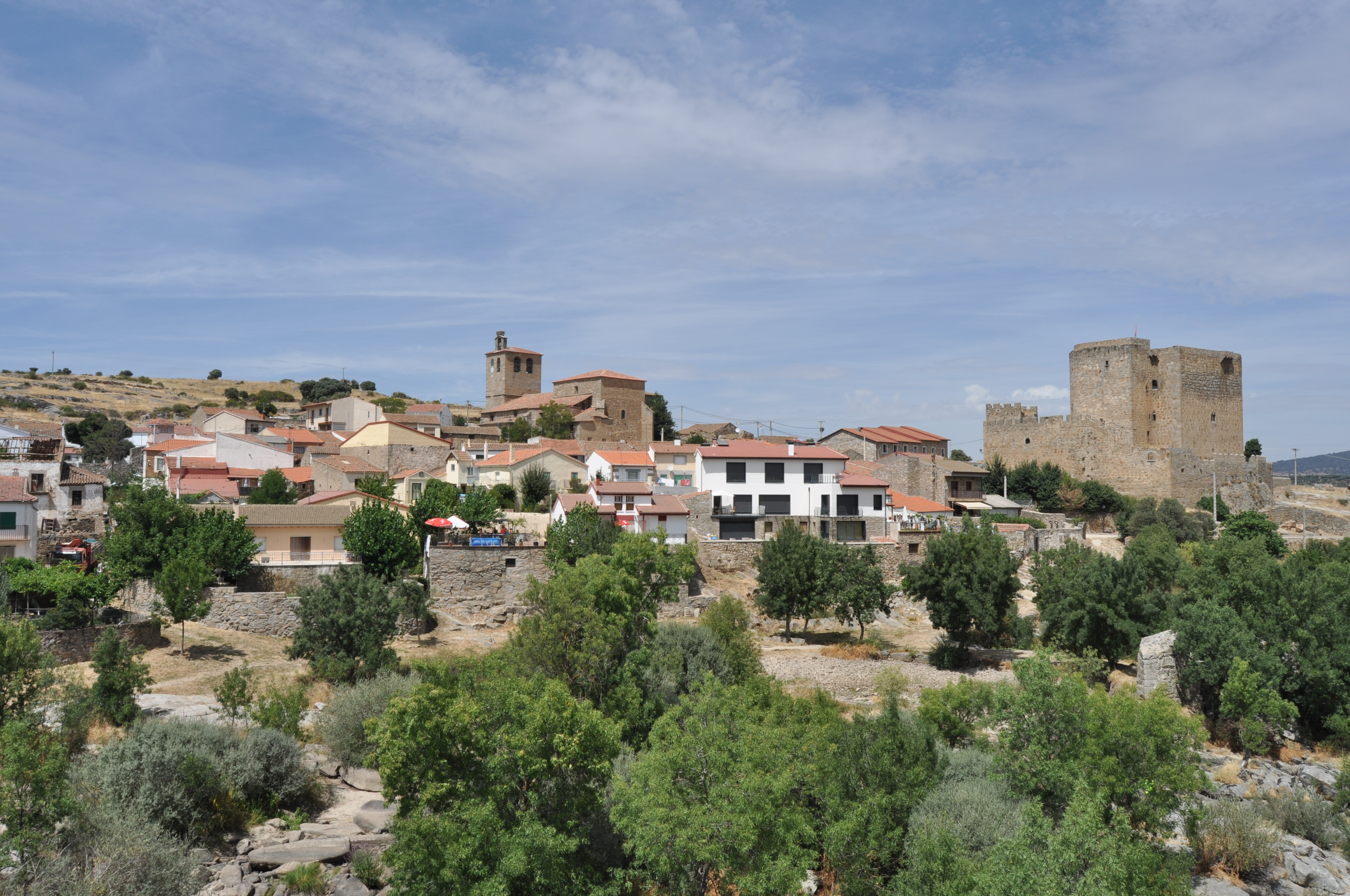 Puente del Congosto - 002